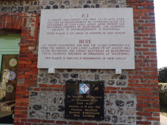 Dieppe_Raid_1942